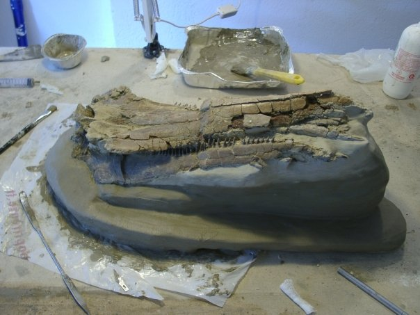 Etruridelphis giulii durante le fasi di recupero